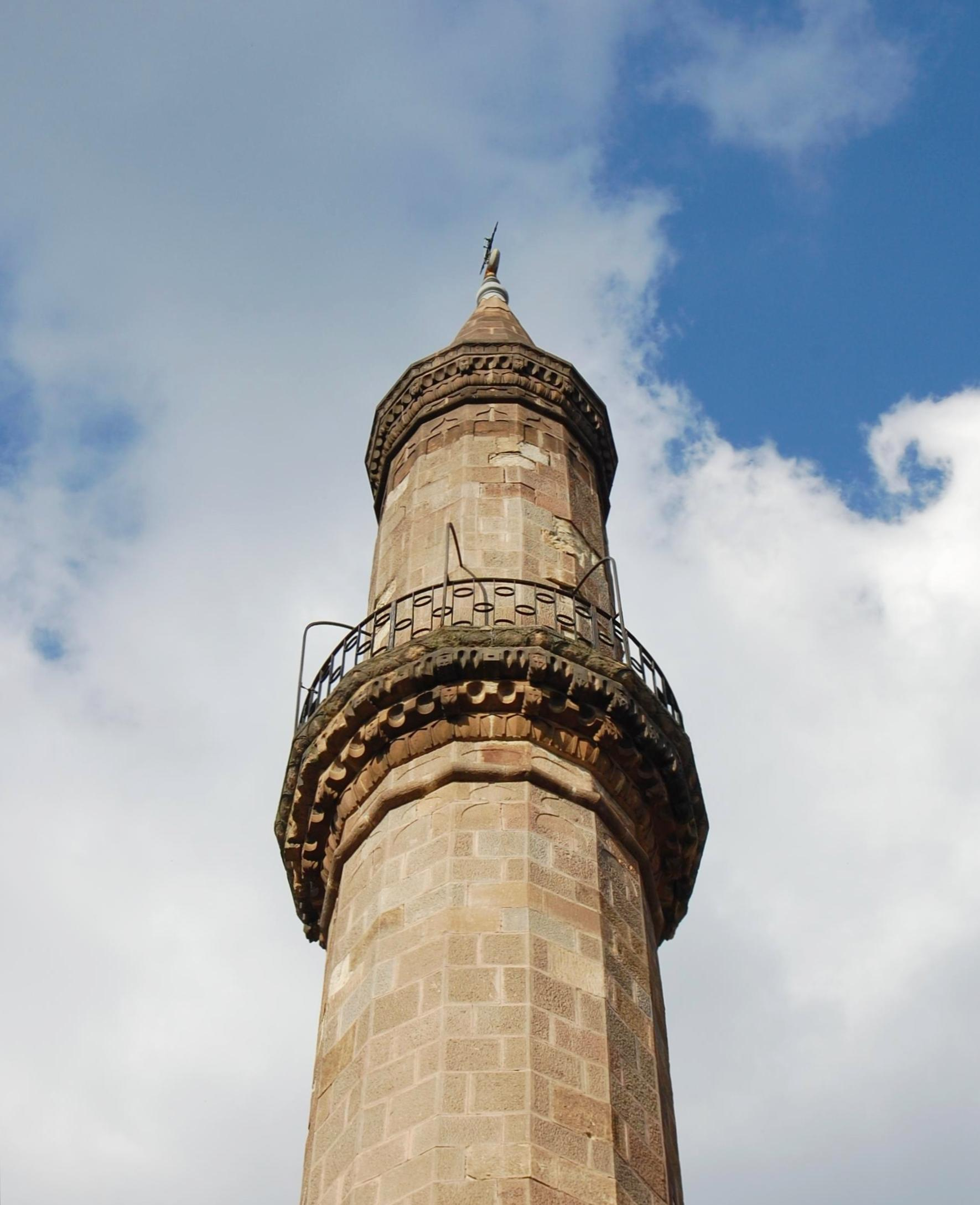 Eger - minaret